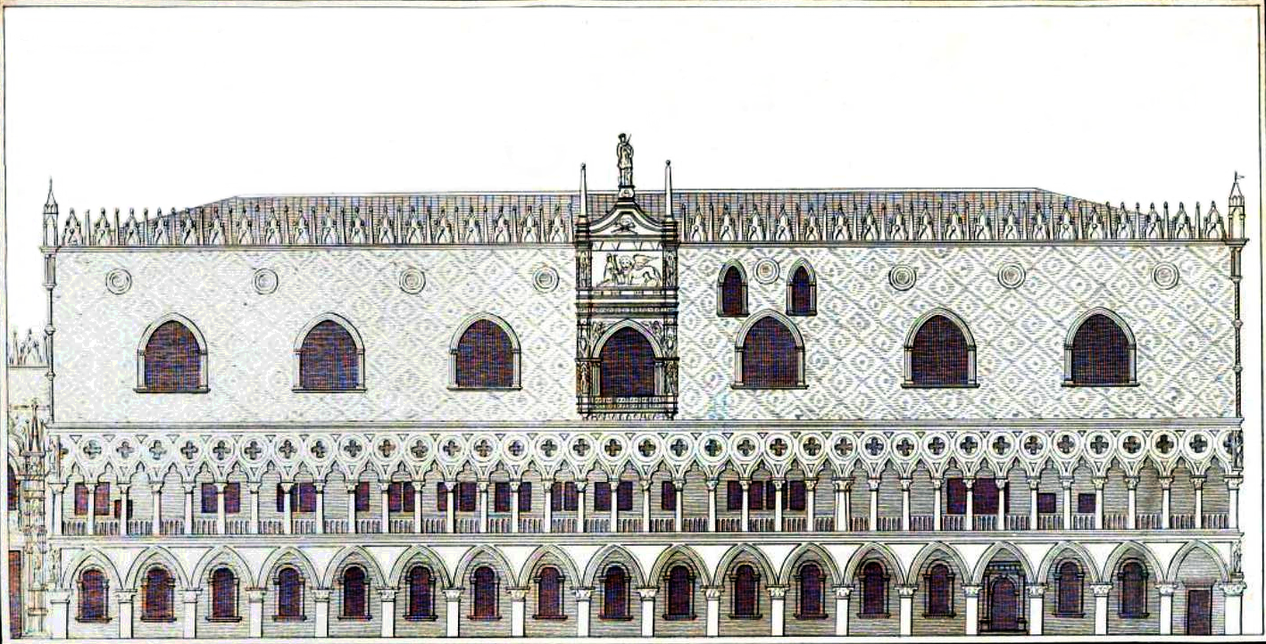 Incisione tratta da: "Il Palazzo Ducale di Venezia illustrato da Francesco Zanotto, con incisioni, Venezia 1841", Tavola 1